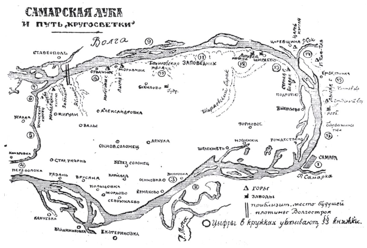 Схема Самарской Луки, Жигулёвской кругосветки и приблизительное место строительства будущей Жигулёвской ГЭС по состоянию планов на 1930 год